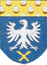 le blason de la commune.